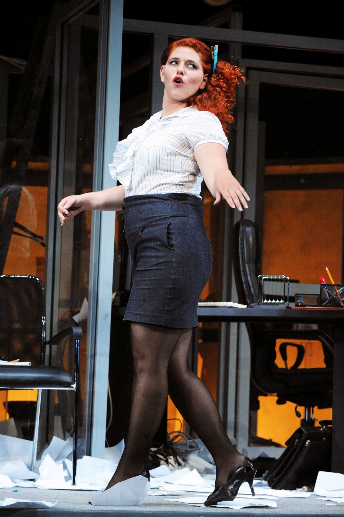 נועה קולר - רומן בעבודה 2009